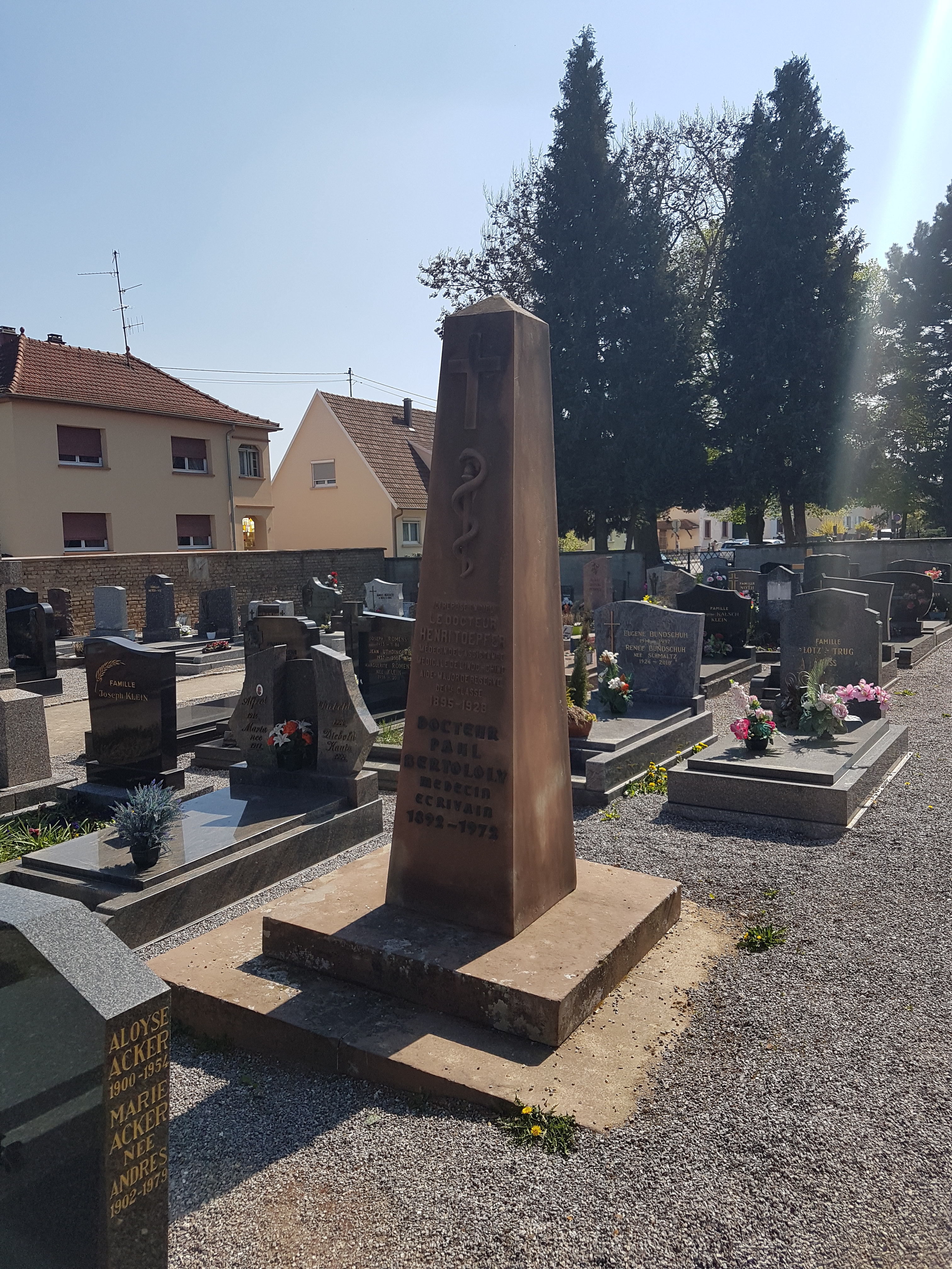 Grabmal für den Schriftsteller Paul Bertololy in Souffelweyersheim